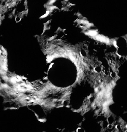 Cráter lunar Shackleton. (Imagen LRO)